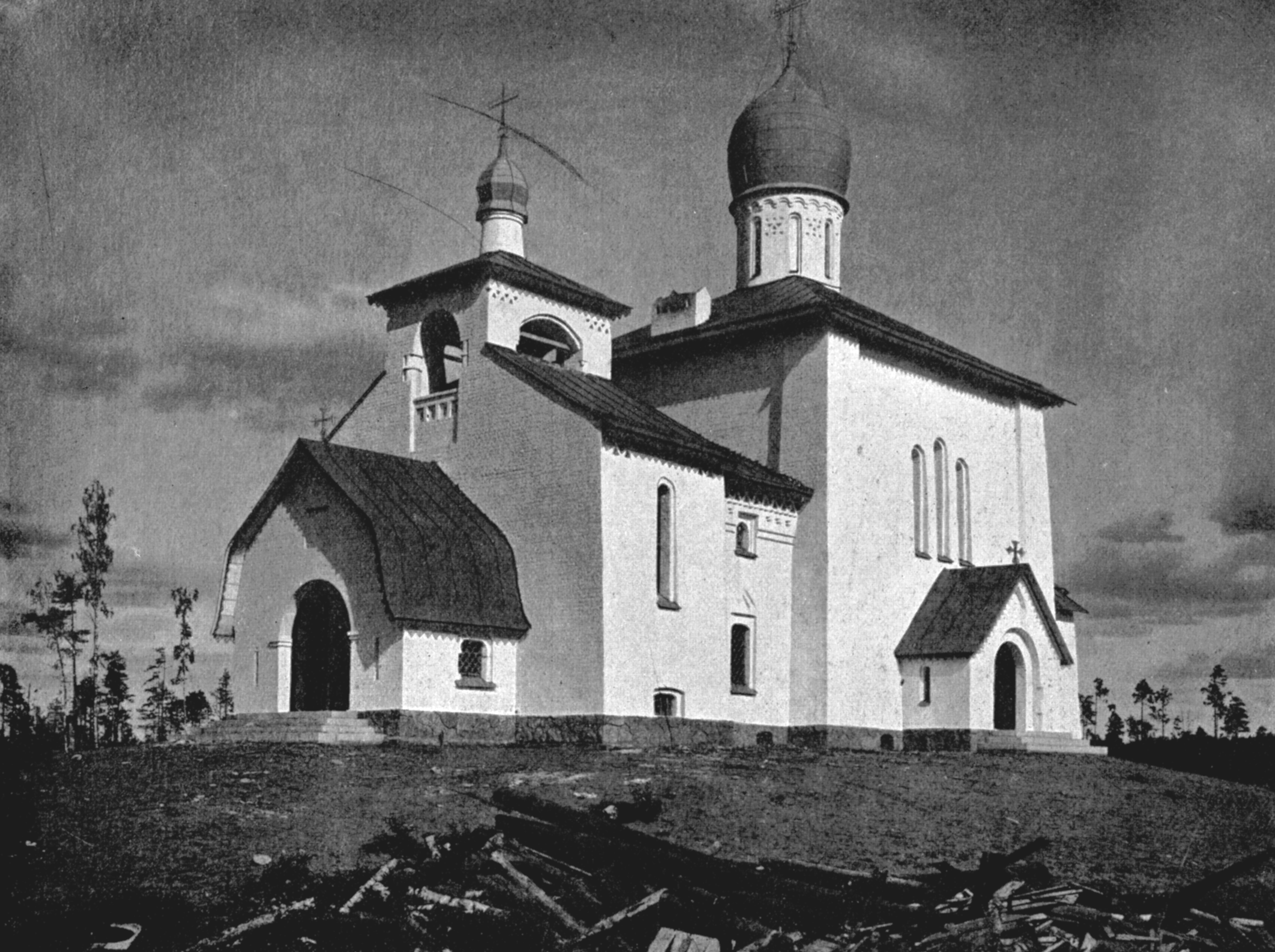 Церковь в имении княгини Юсуповой на реке Мге